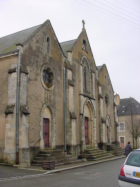 Eglise Saint-Martin de Rouez-en-Champagne vue de face par Utilisateur:Pretorien0 2001-03-04